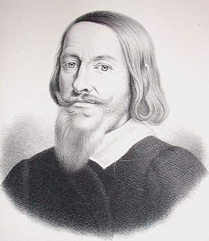 fra J P Traps : Berømte danske mænd og kvinder